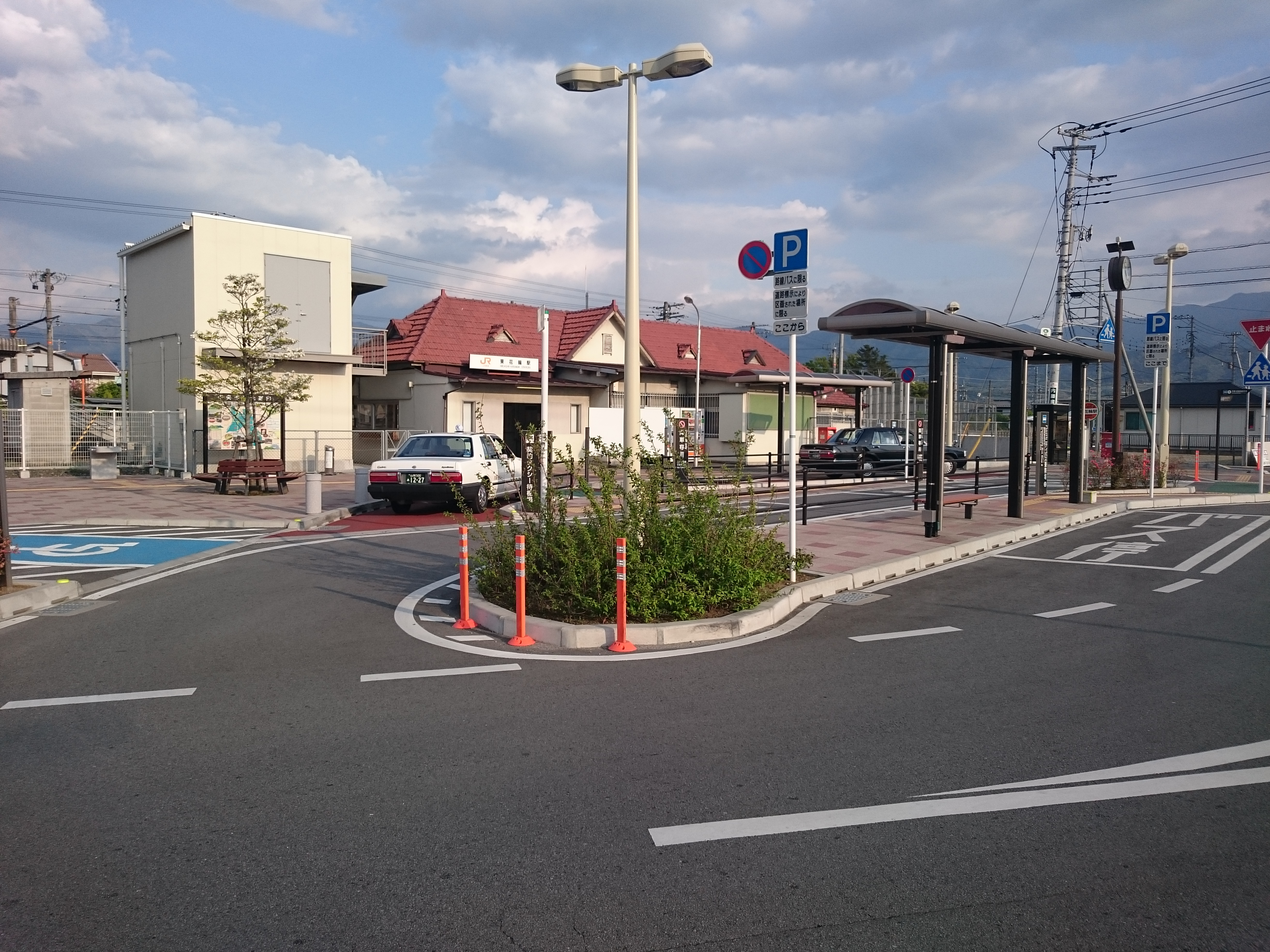 東花輪駅駅舎